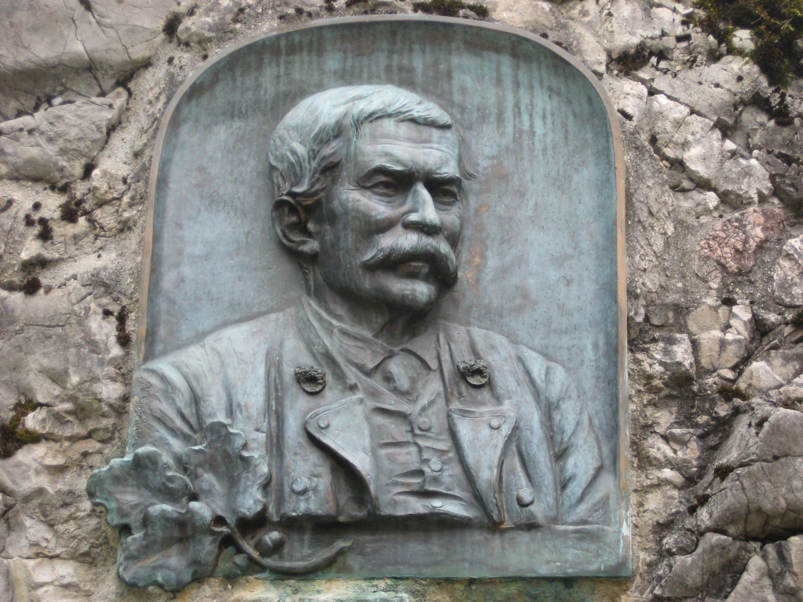 Darstellung von Konrad Deubler auf dem Denkmal in Bad Goisern